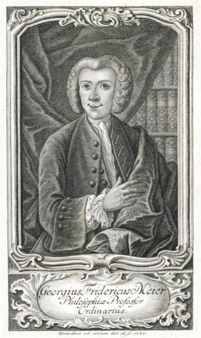 1 grafiskt blad, kopparstick Kopparstick föreställande Georg Friedrich Meier (1718-1777), professor och författare. Konstnär: Gründler